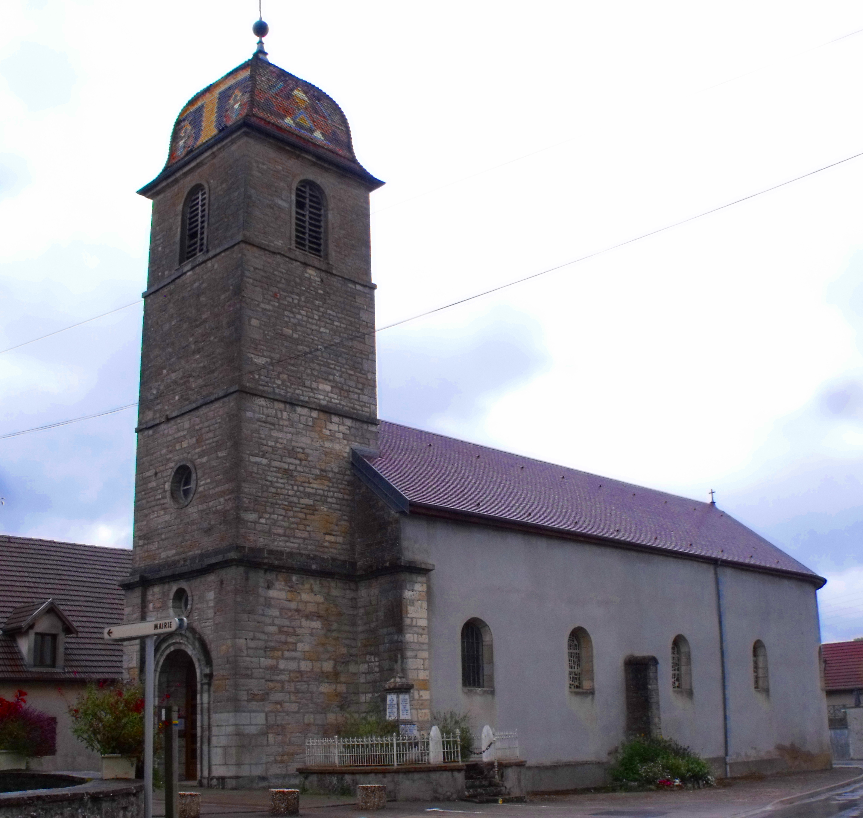 Eglise de Busy, Doubs, France